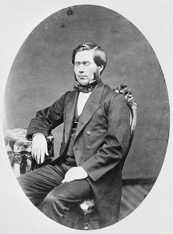 Portrait de Oliver Mowat, premier ministre de l'Ontario.